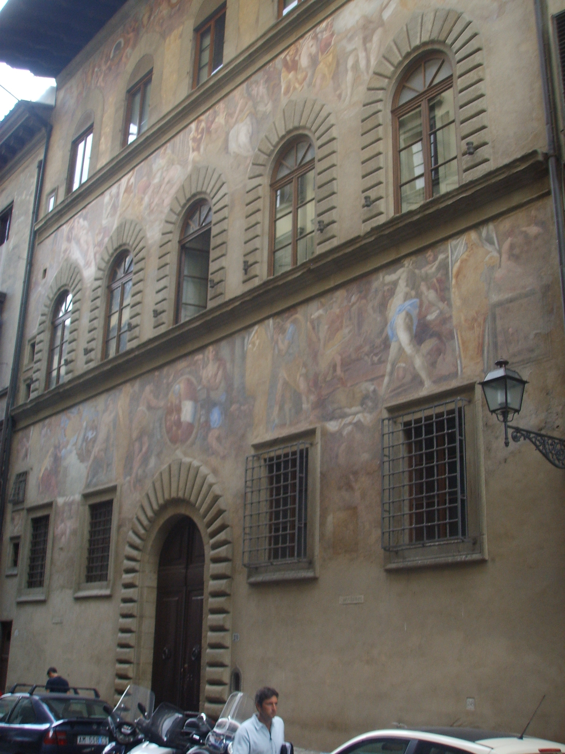 Firenze: il Palazzo già Mellini (oggi Palazzo Fossi), al numero 20 di Via de' Benci, del XV secolo, un tempo celebre per gli affreschi della facciata (opera di Giovanni Stolf), oggi purtroppo piuttosto sbiaditi.